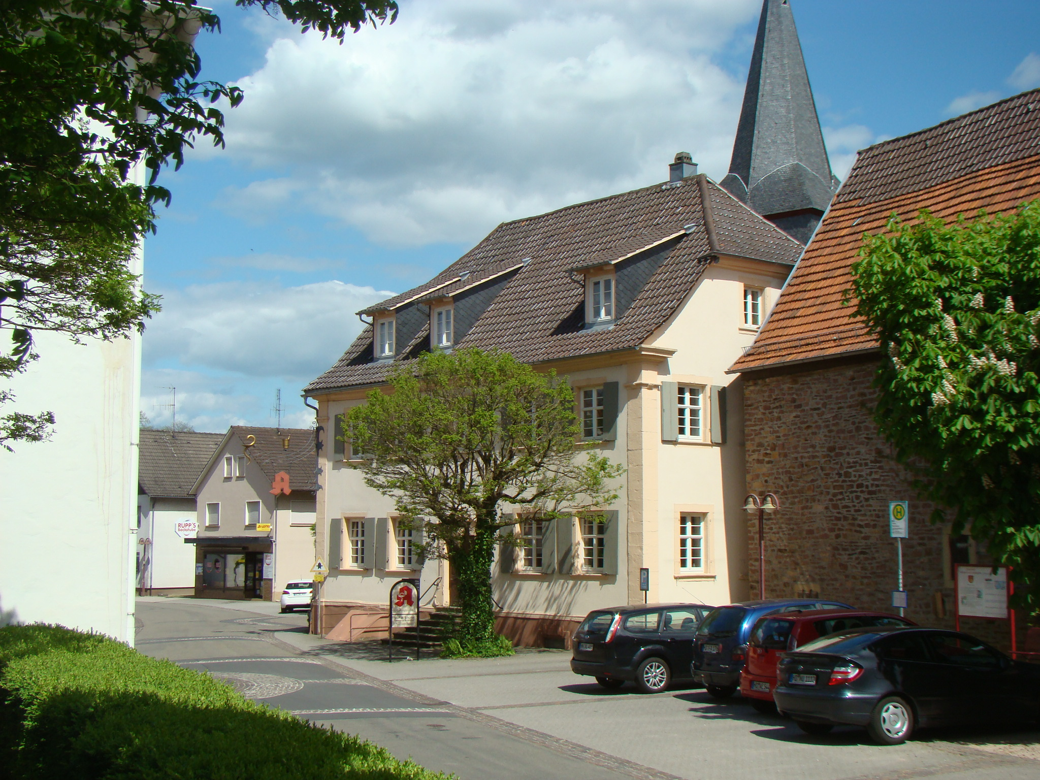 Helmstadt-Bargen, Ortsteil Helmstadt, Raban-Apotheke